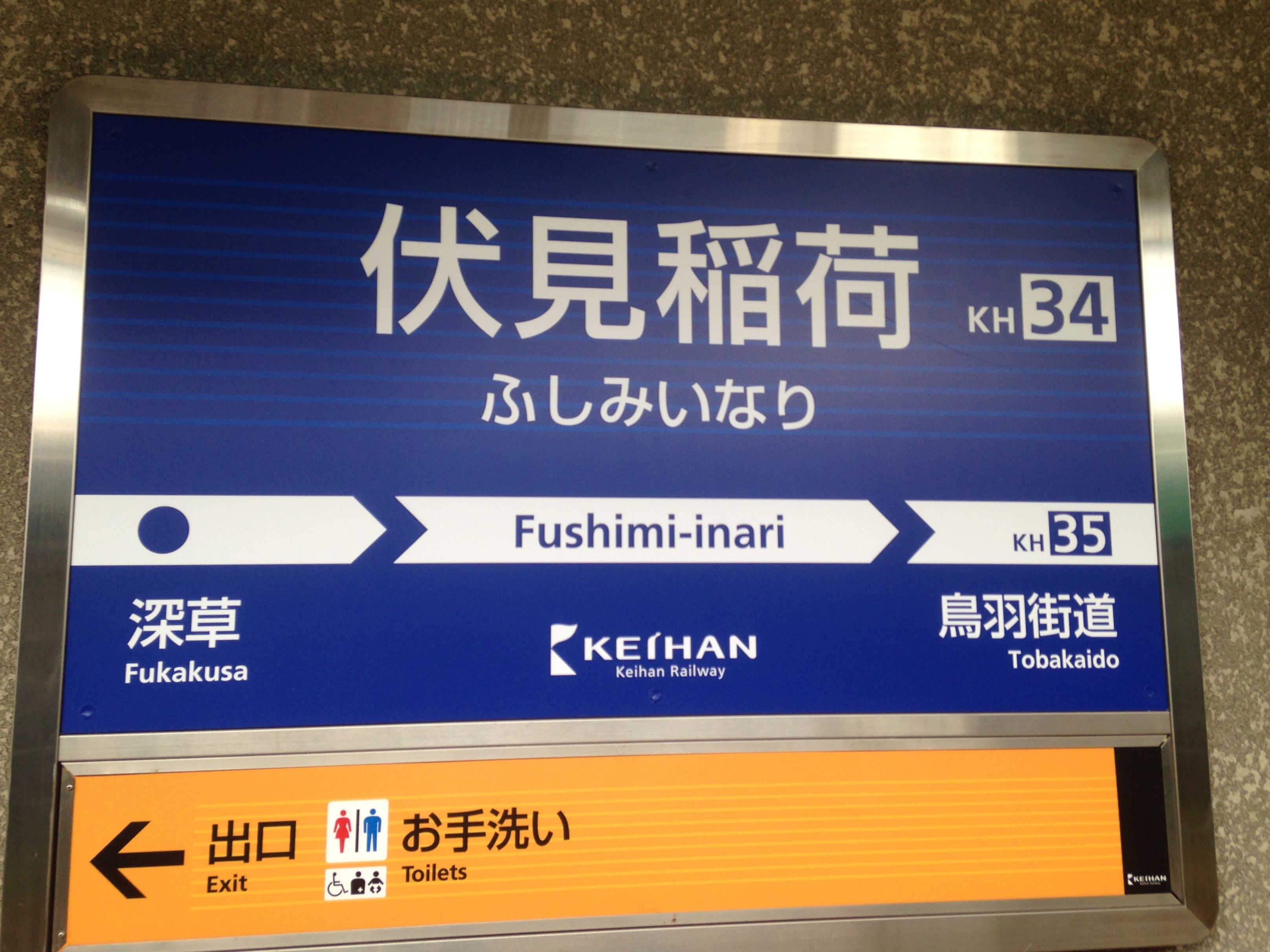 伏見稲荷駅の駅名標